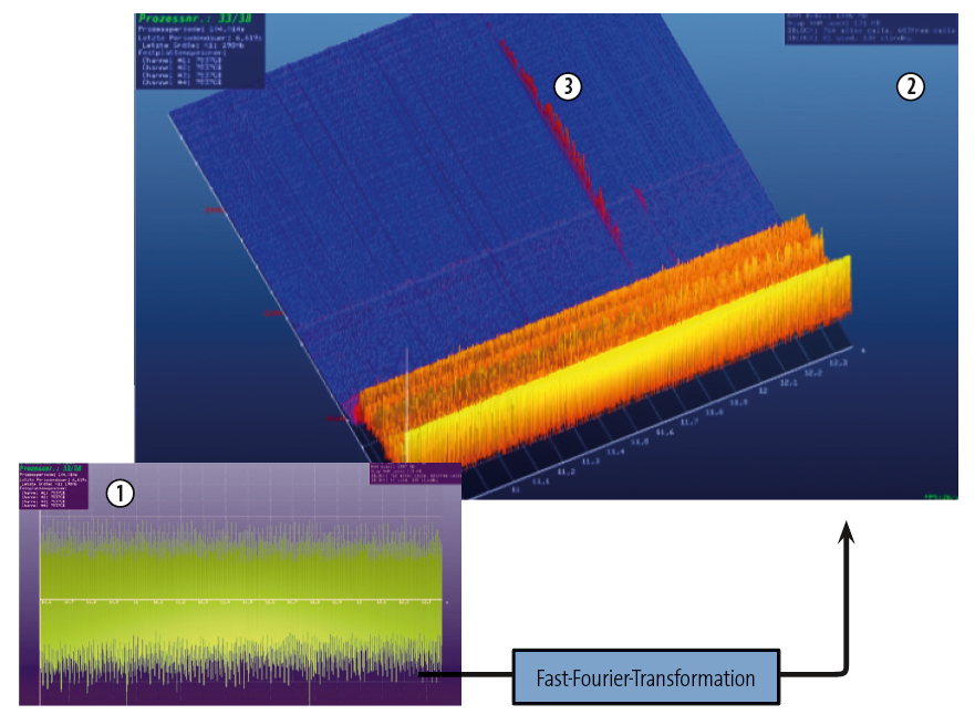 Prinzipielle Funktionsweise der HFIM-Technik